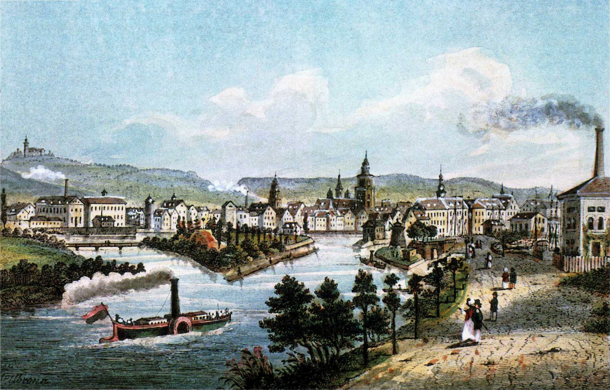 Neckar in Heilbronn mit Schleuse zum Wilhelmskanal (rechts)